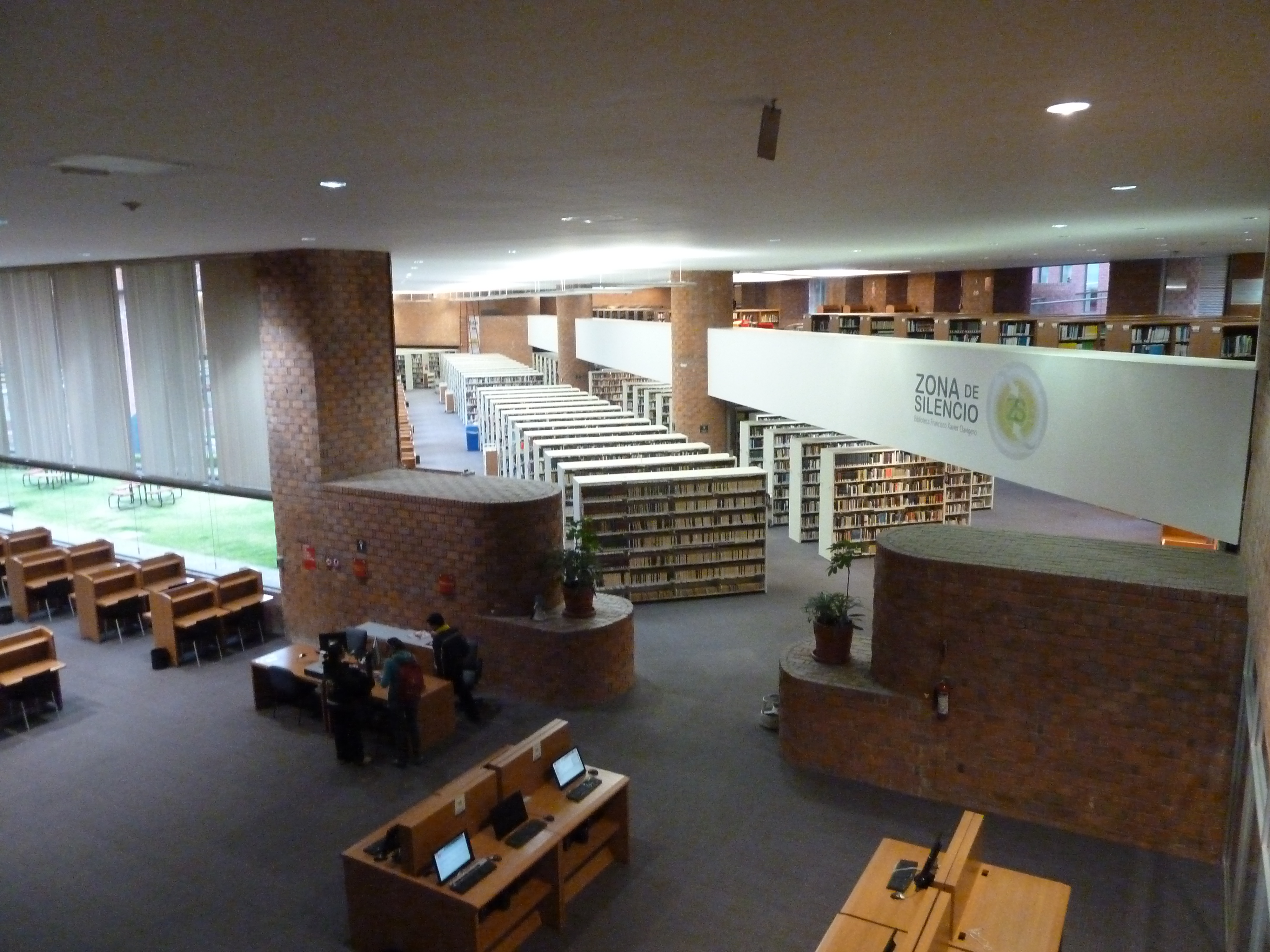 Universidad Iberoamericana, Sede Mexico Santa Fe, Biblioteca Francisco Xavier Clavigero